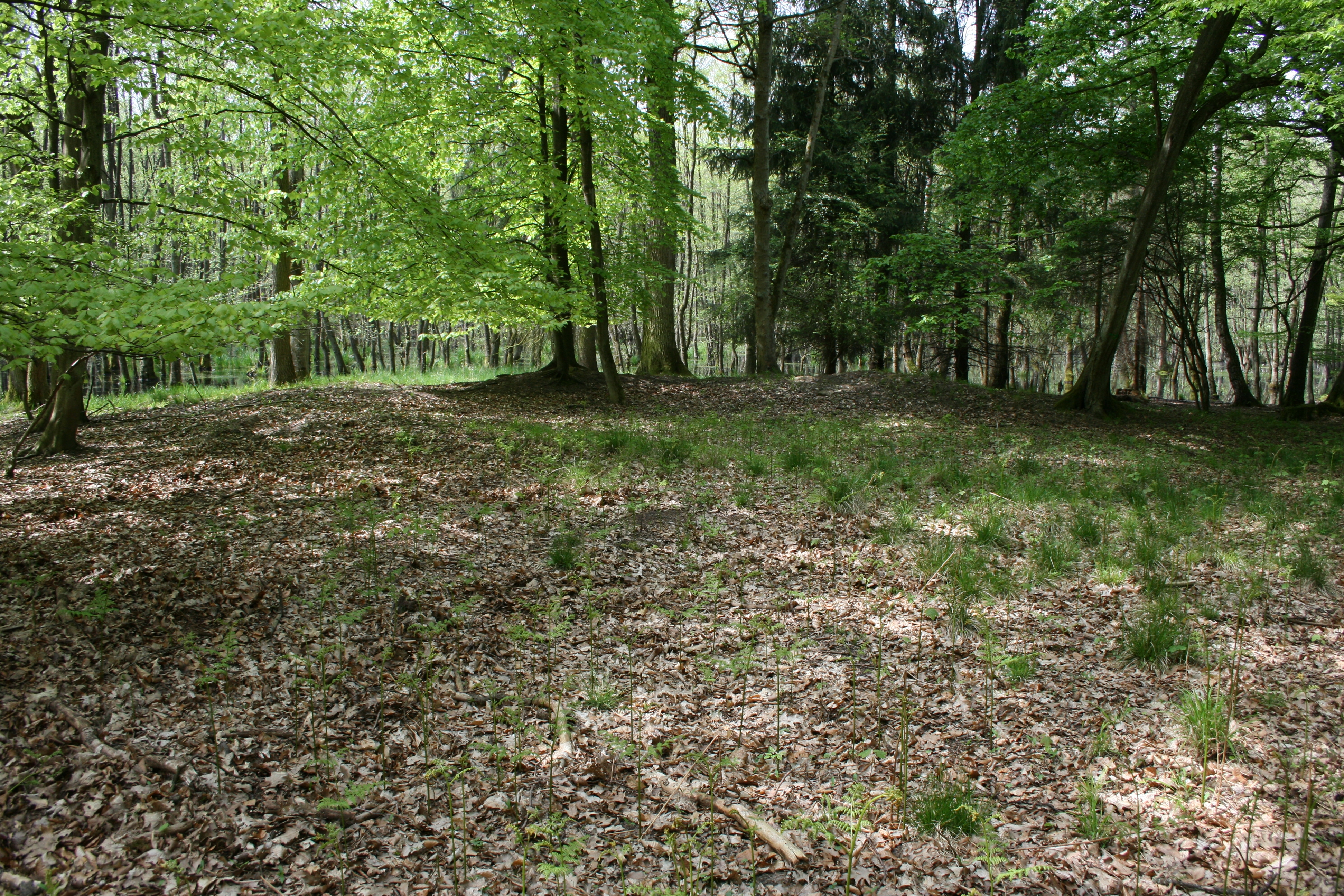 Durchwühlte Steinturmstelle des Wp 5/12 am "Doppelbiersumpf" bei Hanau. Im Hintergrund das Sumpfgebiet, wo der Limes als Knüppelweg angelegt war.